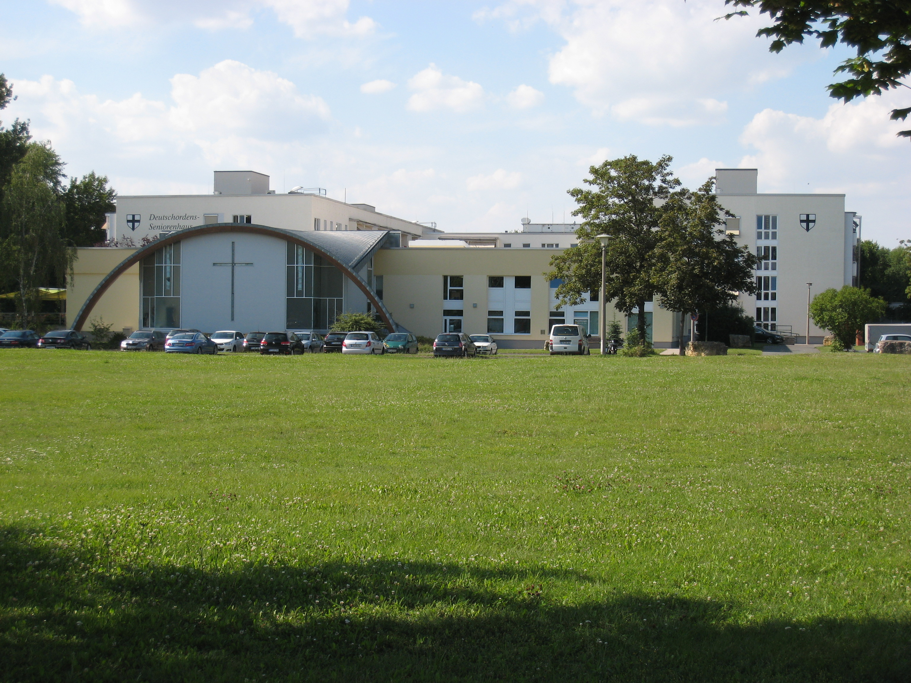 Seniorenhaus des Deutschen Ordens in Erfurt (Vilniuser Straße 14).